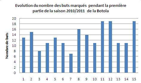 Nombre de buts (1ère partie - saison 2010/2011 - Botola - Maroc)